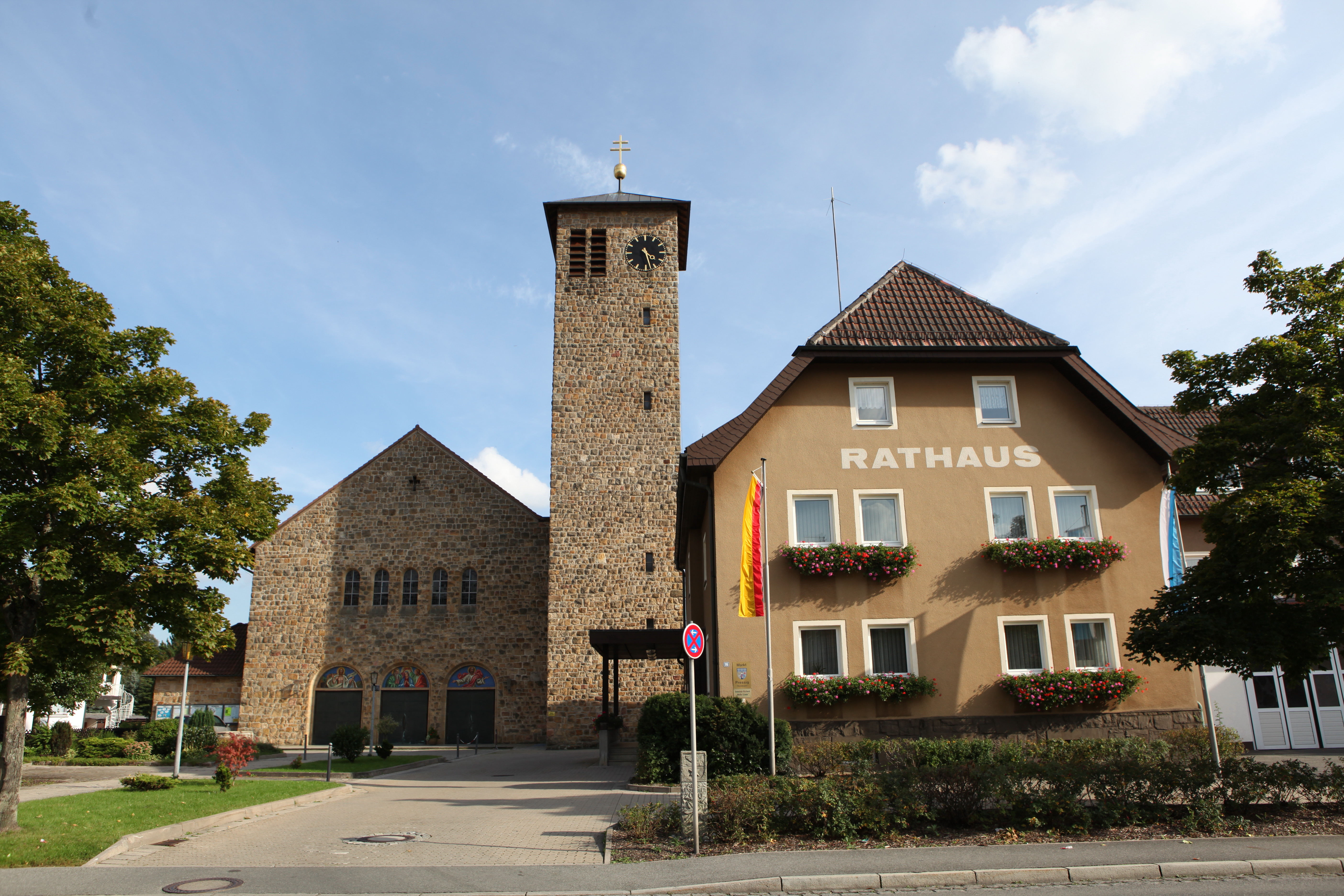 Katholische Herz Jesu Kirche und Rathaus in Pressig, Landkreis Kronach